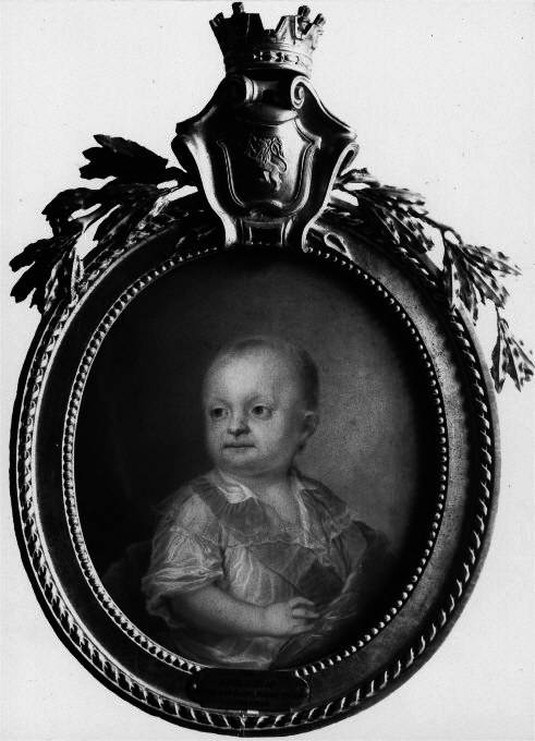 Portrait de Charles-Gusta e de Suède, duc de Småland